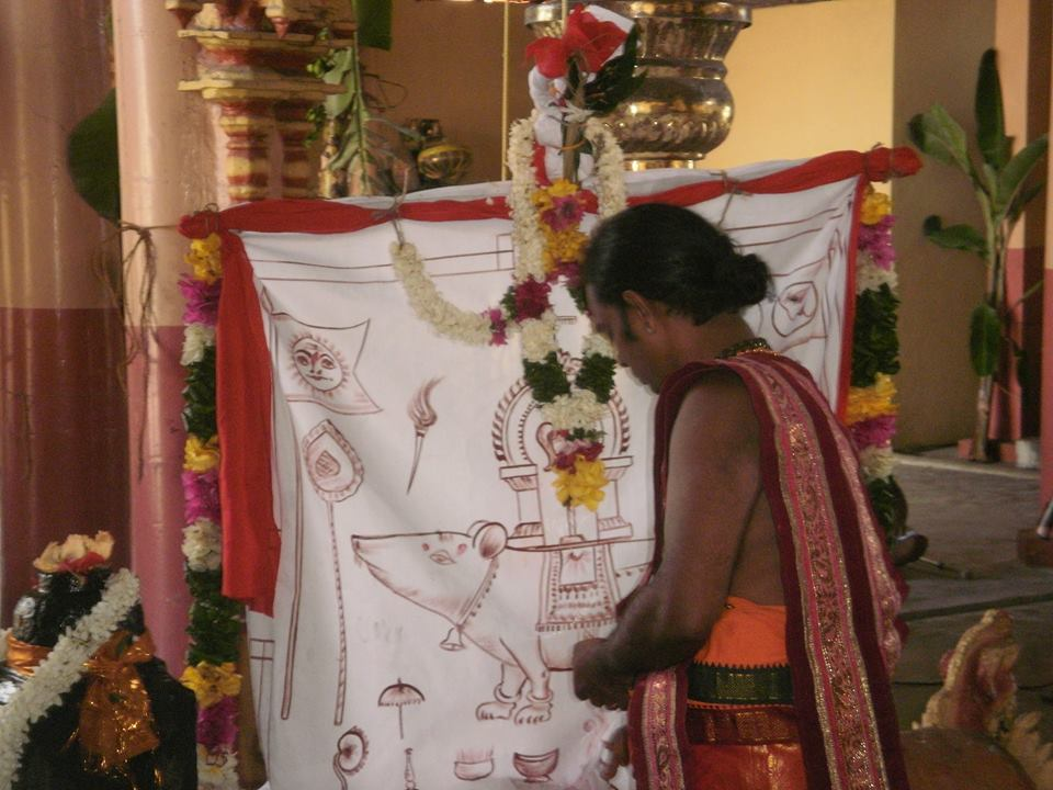 கொடியேற்றம்